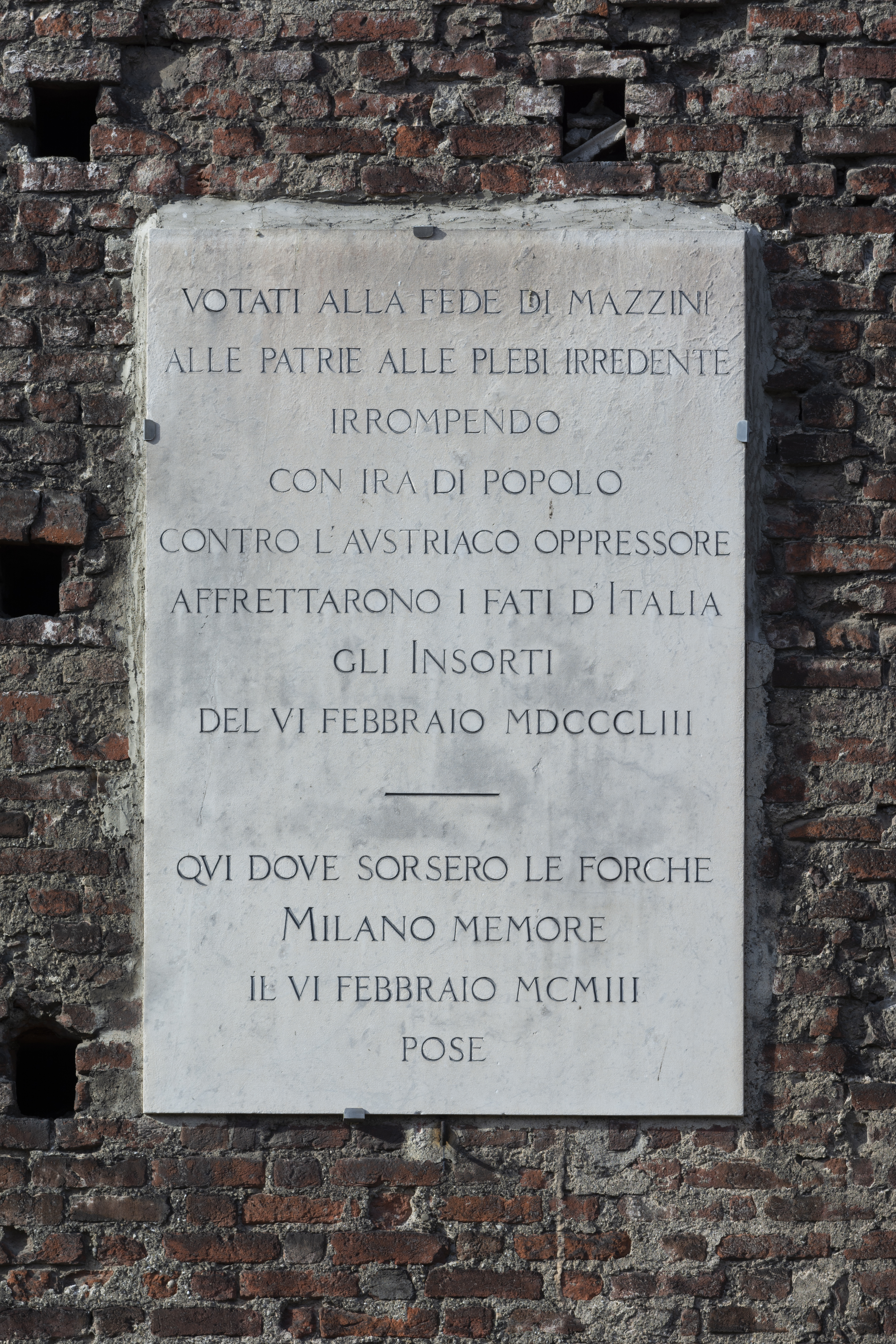 Insorti del 6 febbraio 1853